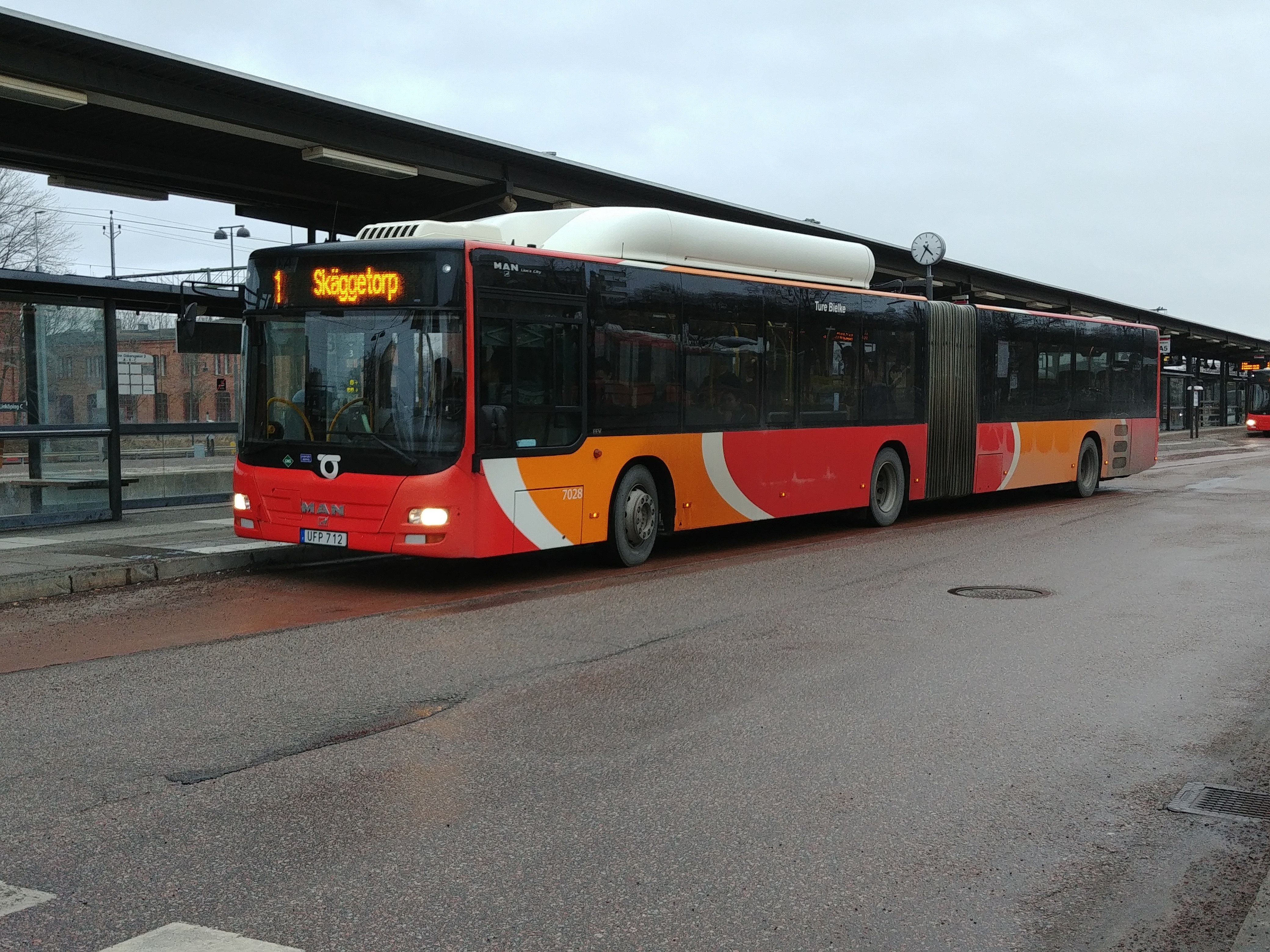 A bus in the Swedish city of Linköping, driving on route 1 towards Skäggetorp. Model: Man Lion´s City A23 CNG. Unit: 7028, owned by Transdev, operated by Transdev.